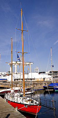 Joshua, bateau de Bernard Moitessier Photo issue de ma banque d'images personnelle : Pep.per 20 mars 2006 à 23:53 (CET)